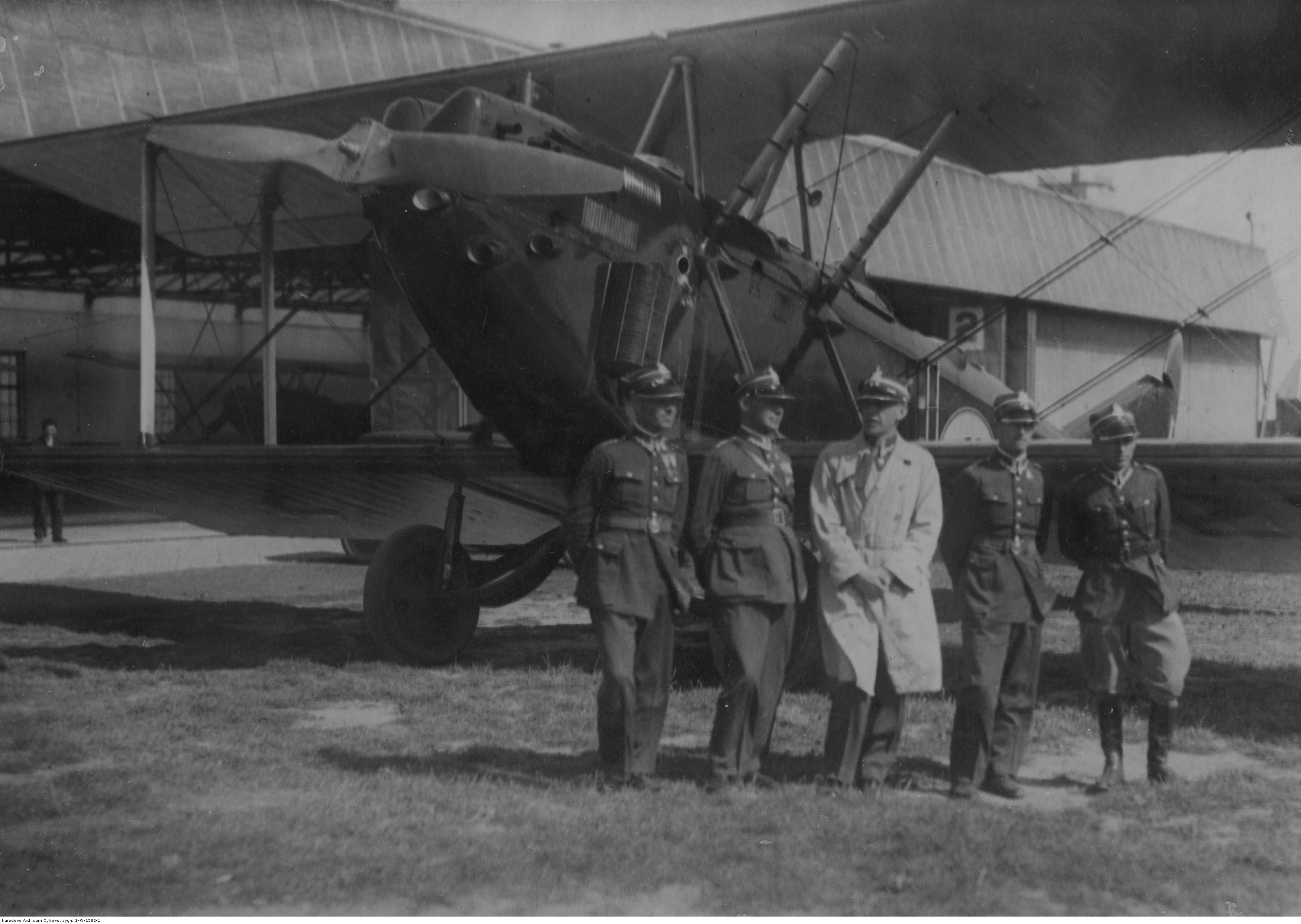 Pięciu lotników 3. Pułku Lotniczego w Poznaniu przed samolotem Lublin R-VIII ter.